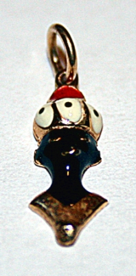 Morčić, suvenir Rijeke